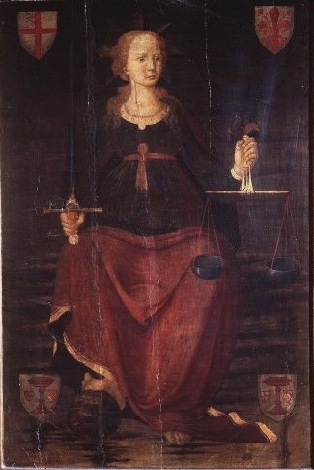 Justice Biagio di Antonio Tucci